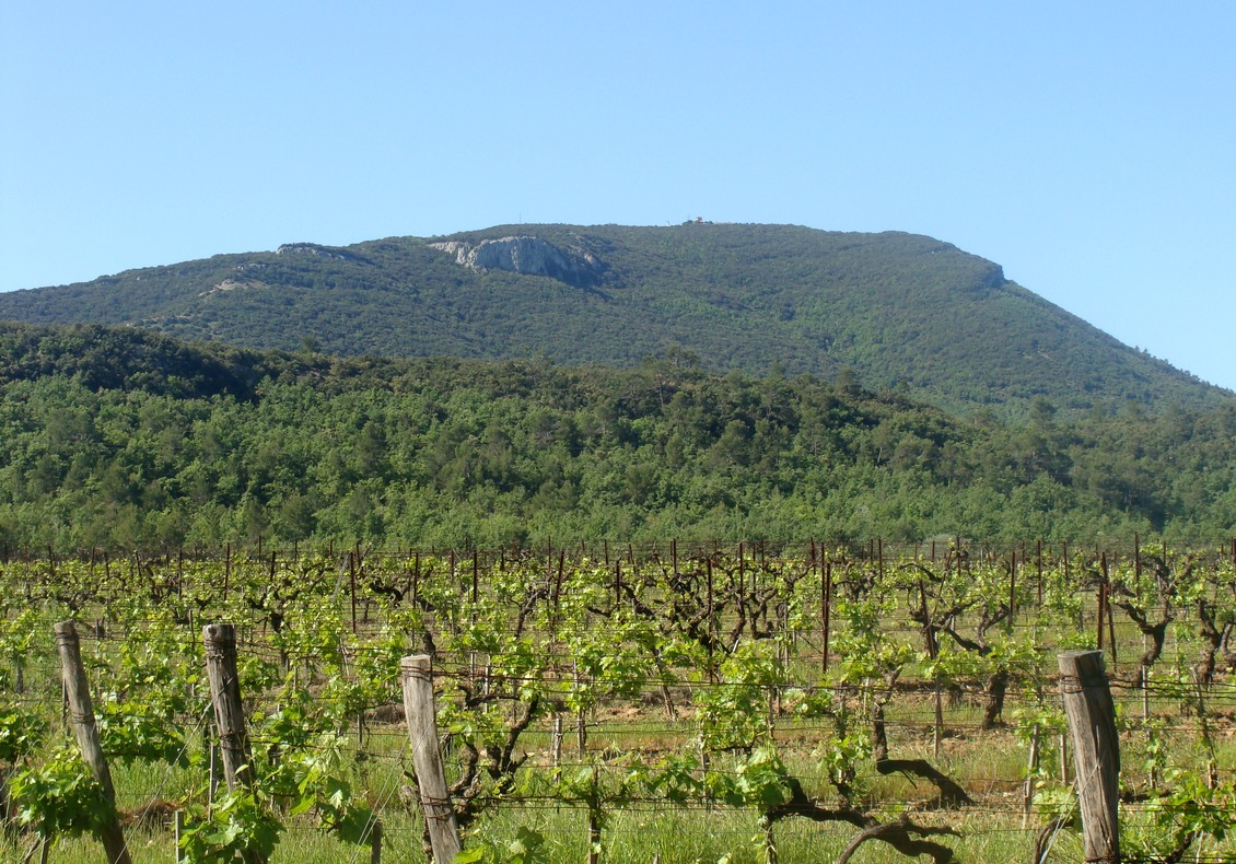 Le Gros Bessillon, vu du nord (route D 560 Barjols - Sillans).